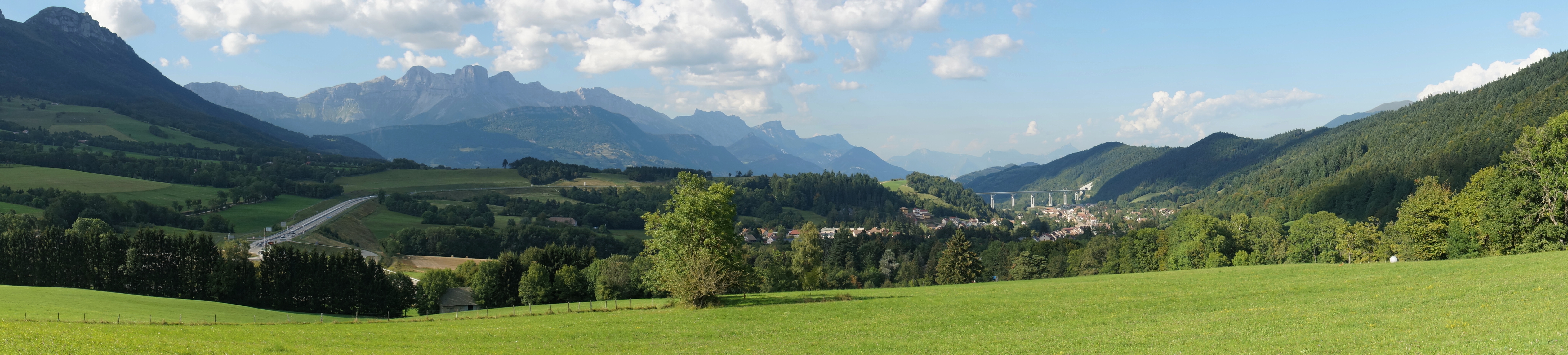 Panorama du col du Fau et Monestier-de-Clermont